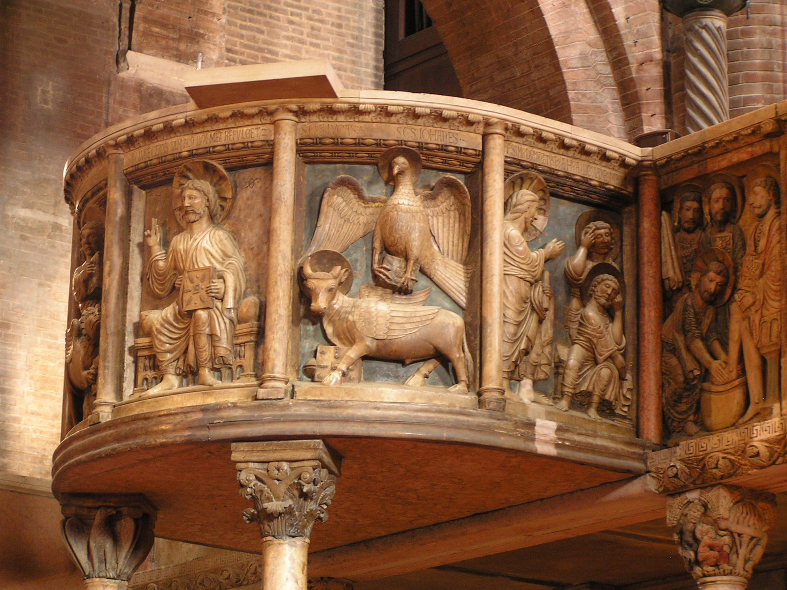 Dettaglio del pontile dei Campionesi, con i simboli dei quattro evangelisti.